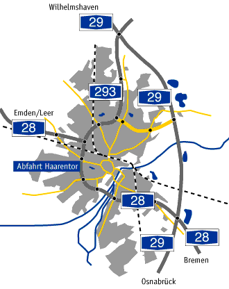 Das Autobahnnetz der Stadt Oldenburg